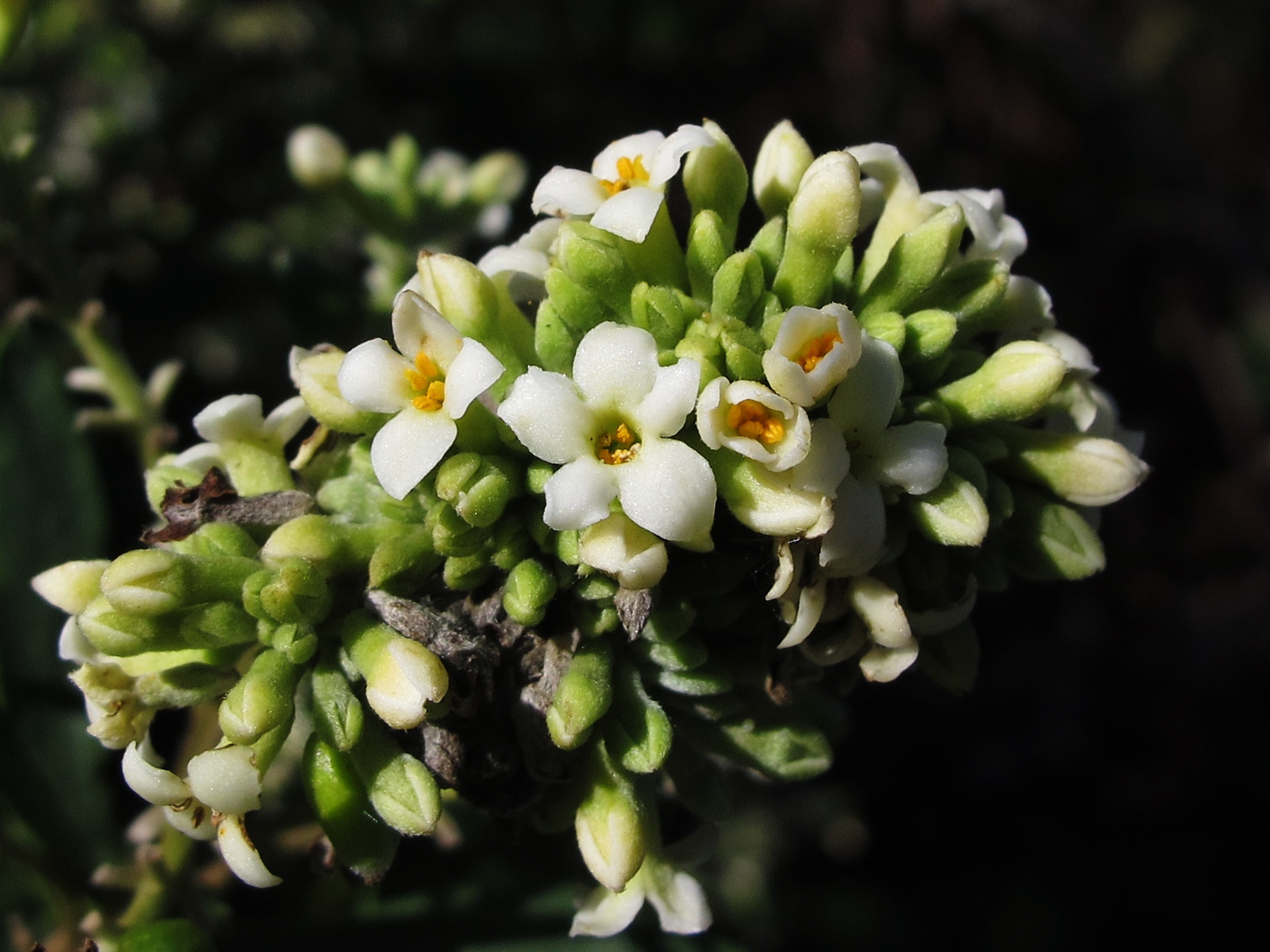 El torvisco es una especie del grupo de plantas ictiotóxicas, es decir, las que al contener sustancias que envenenan a los peces facilitan su captura, ya sea a mano o con redes. Hay constancia de su uso desde el siglo XIII. Por ejemplo en las ordenanzas municipales de Ulldemolins en Cataluña, del siglo XV, existe prohibición de echar al río torvisco, bajo pena de severas y costosas multas